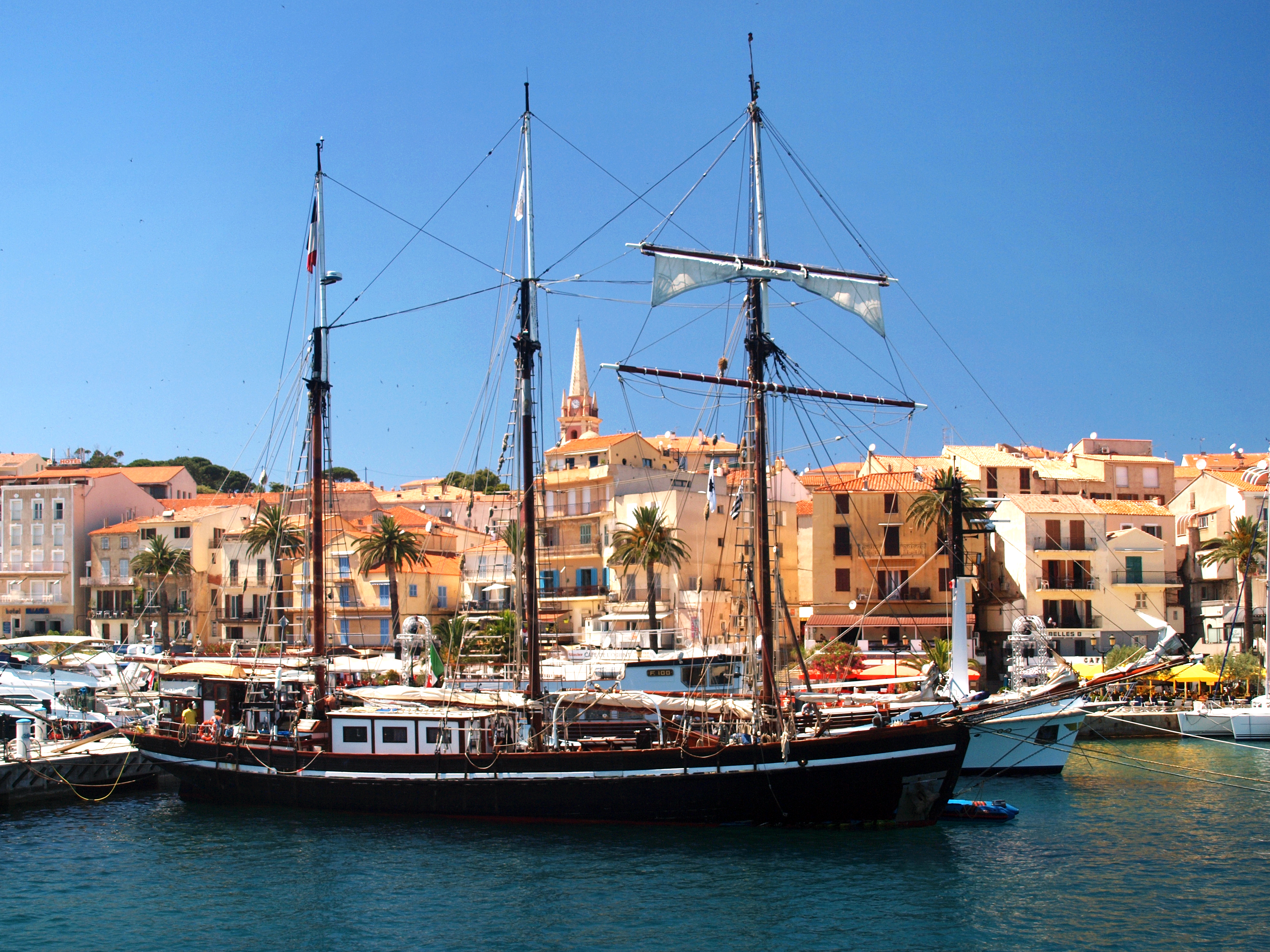 Calvi, Balagne (Corse) - La goelette "Bel Espoir II" à quai pour l'émission Thalassa du 15-06-2012 sur la chaîne FR3